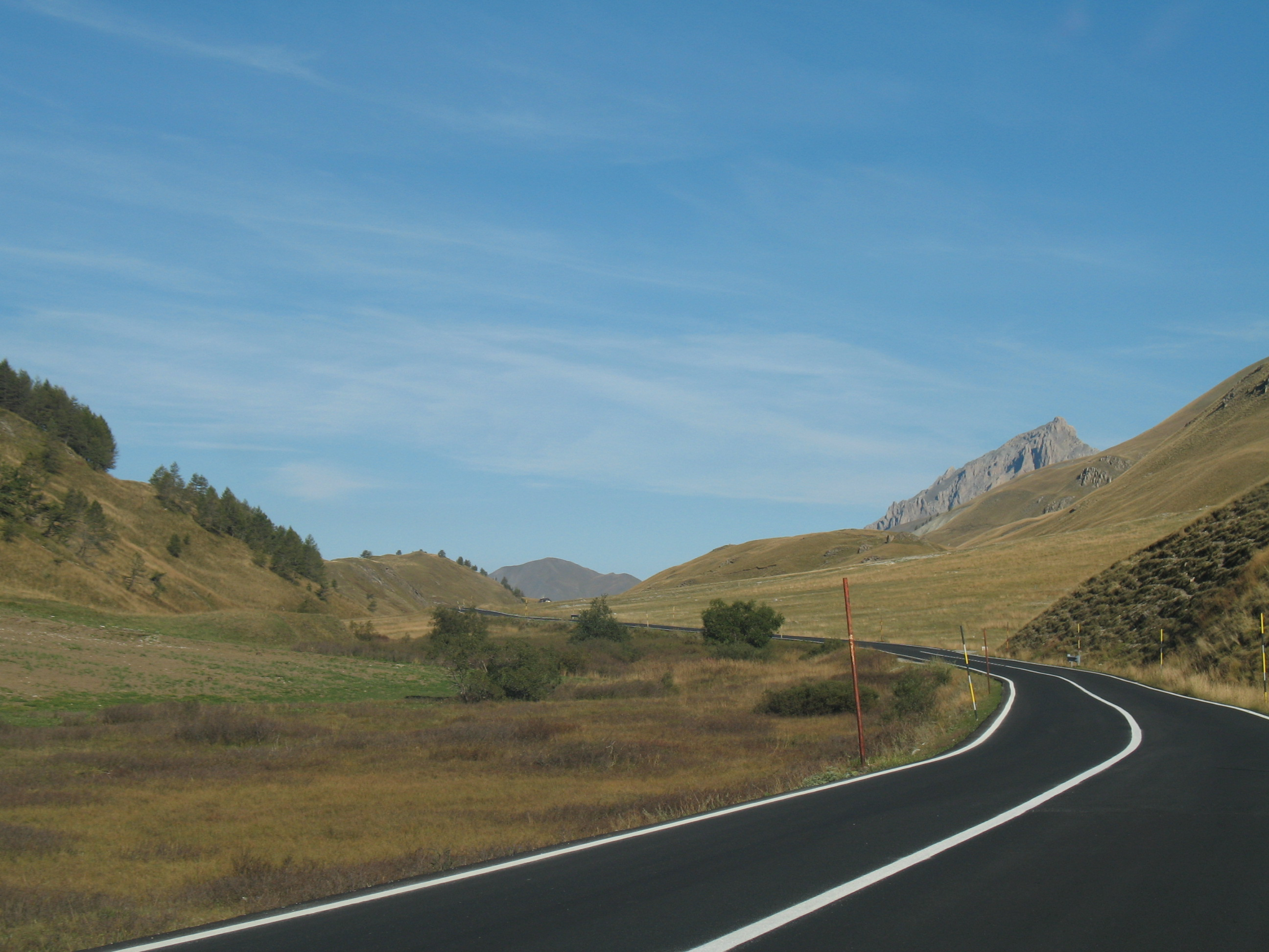 Colle della Maddalena (Italia) - Col de Larche (France)